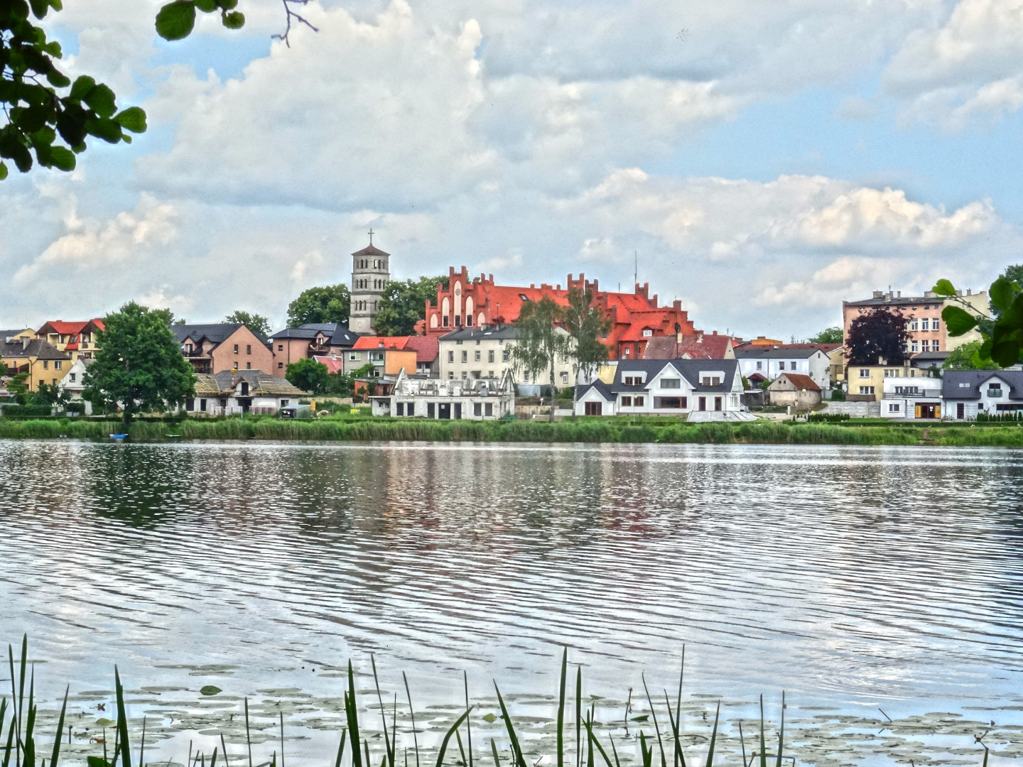 Panorama Starego Miasta w Złotowie znad jeziora Miejskiego